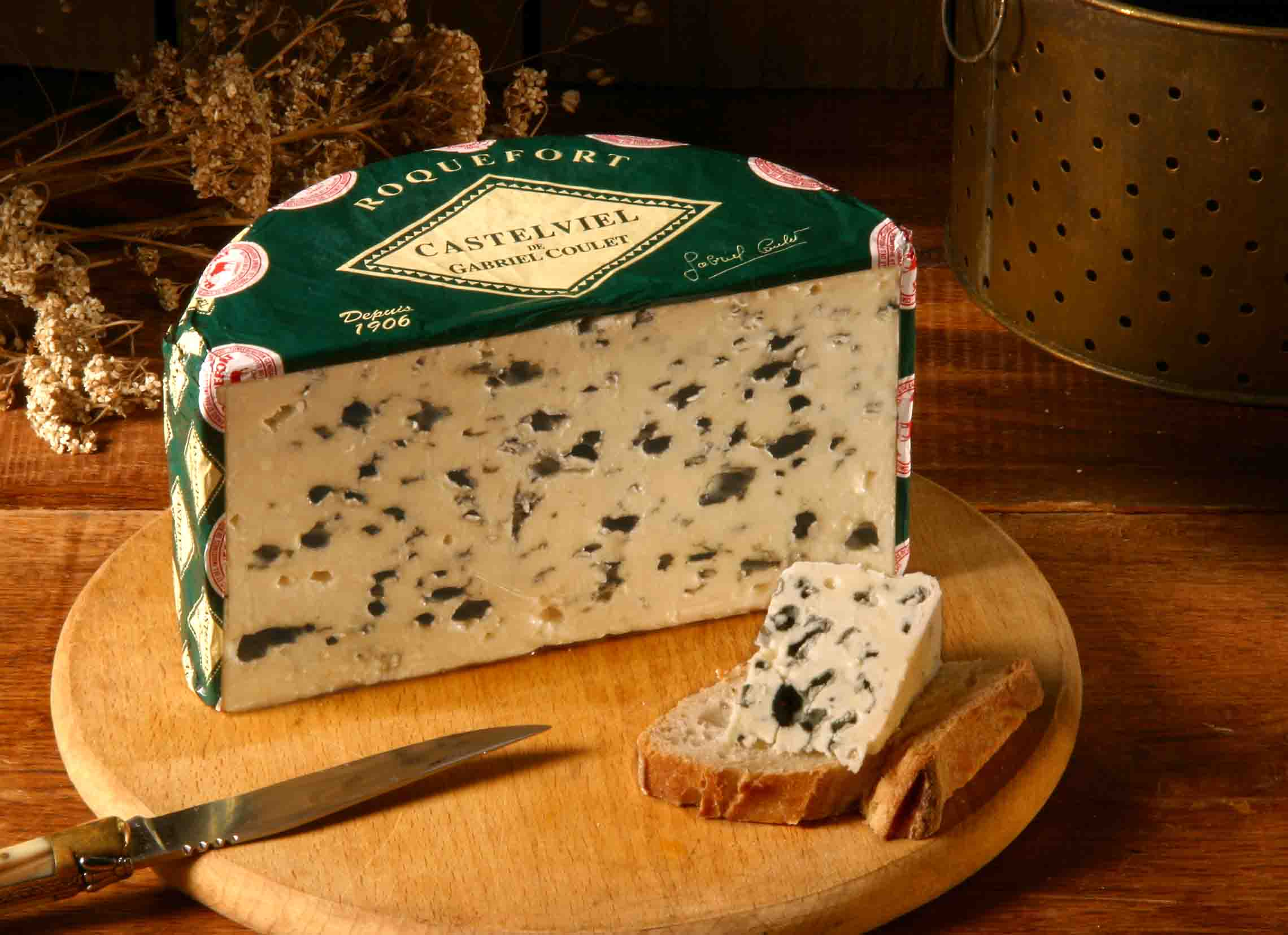 Un demi-pain de roquefort Castelviel Gabriel Coulet, déballé partiellement, présenté sur une planche.